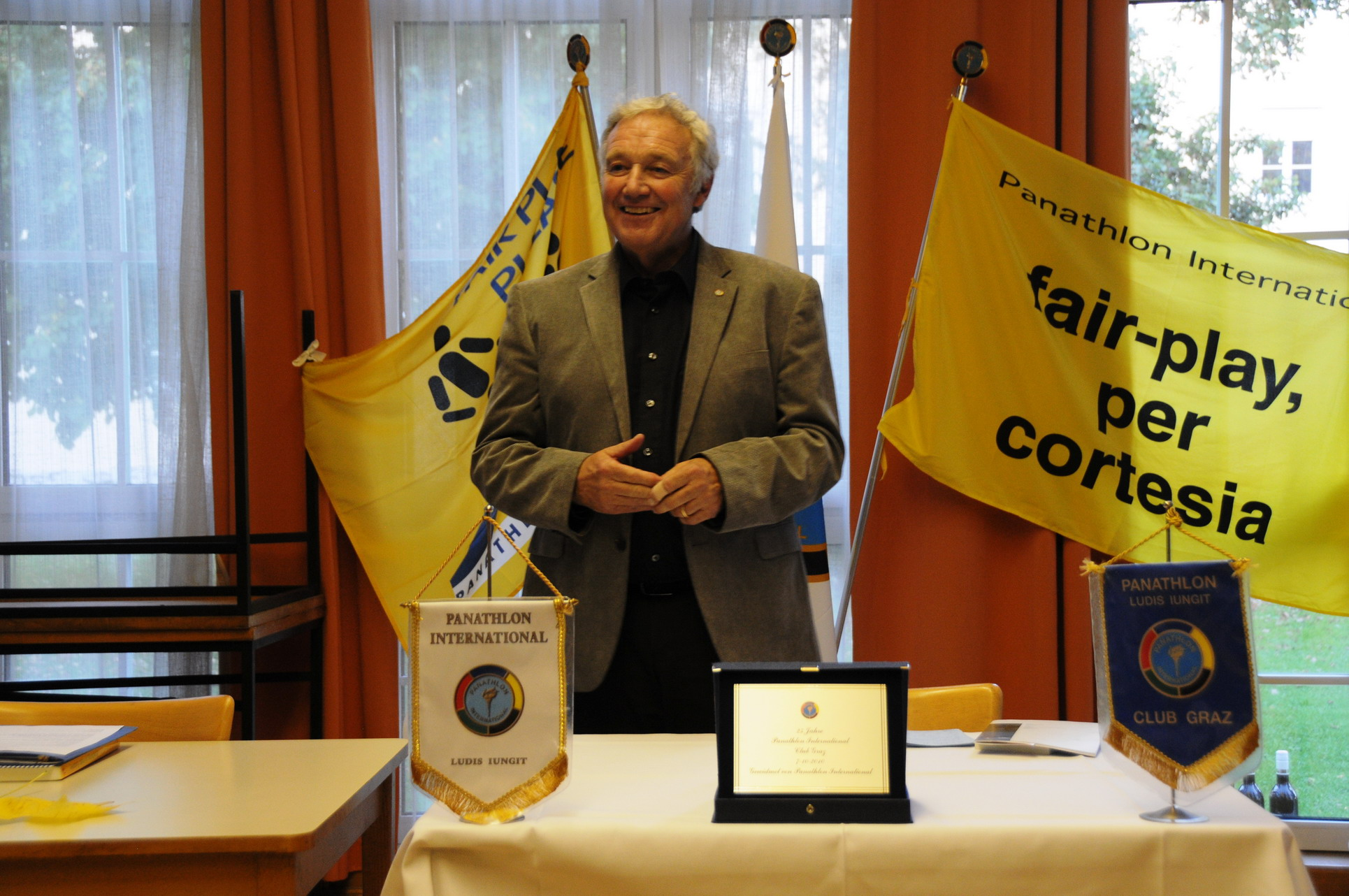 Arturo Hotz bei einem Vortrag